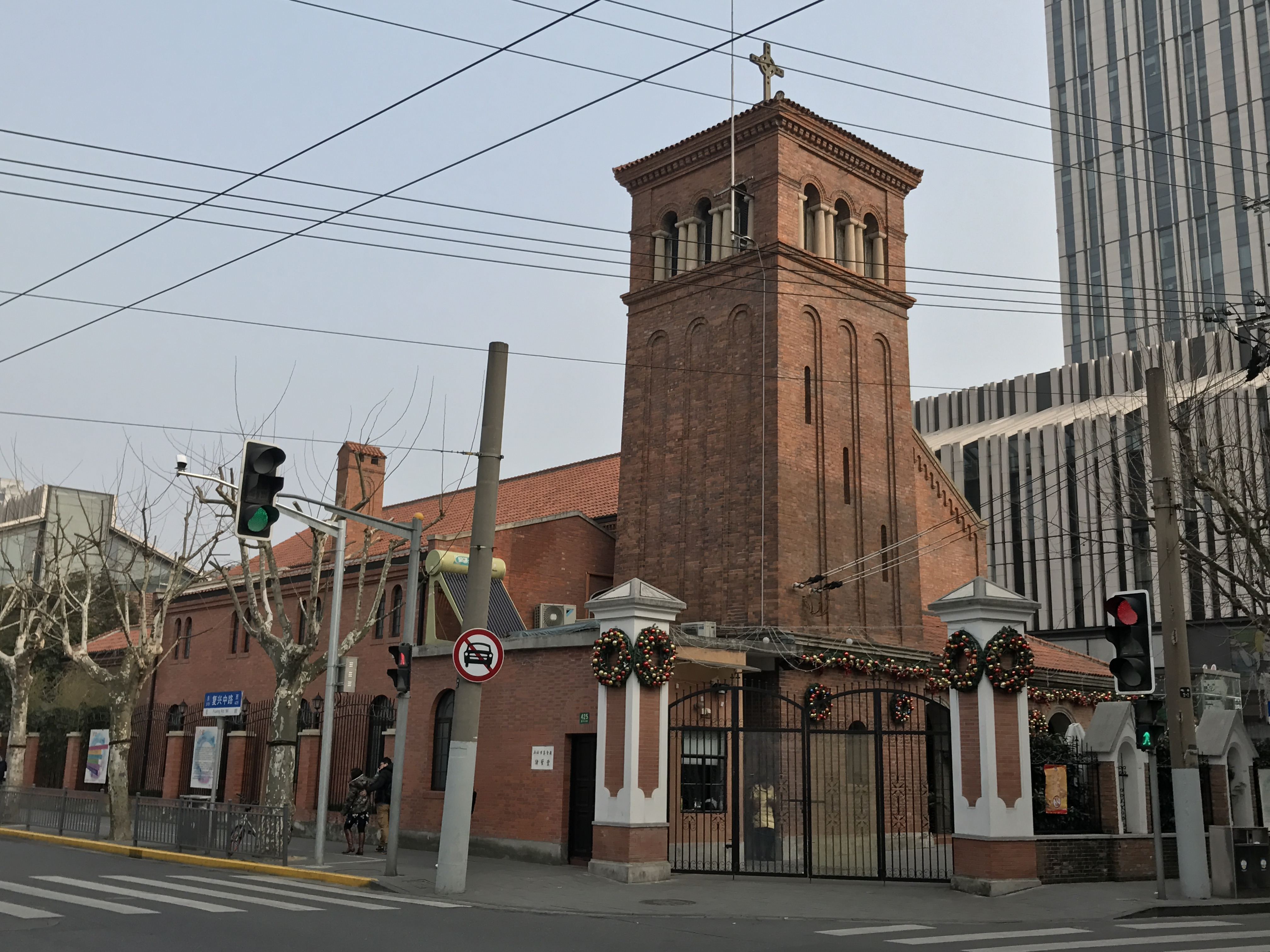 中文（中国大陆）: 诸圣堂 复兴中路425号